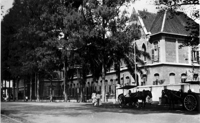 Prentbriefkaart. Het schoolgebouw uit 1920 van de Zusters Ursulinen aan de Tjelaket in Malang, Oost-Java.